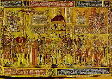 Peter Heymanns (niederländischer Bildwirker), nach dem Bildkonzept der Werkstatt Cranach (Wittenberg), Kartonmaler unbekannt: Croy-Teppich (1554/1556), Bildwirkerei (Wolle, Seide, Leinengarn, Metallfäden), 4,46 m x 6,90 m. Das in Stettin in der Basselisse-Technik gewirkte Werk befindet sich im Besitz der Ernst-Moritz-Arndt-Universität in Greifswald.